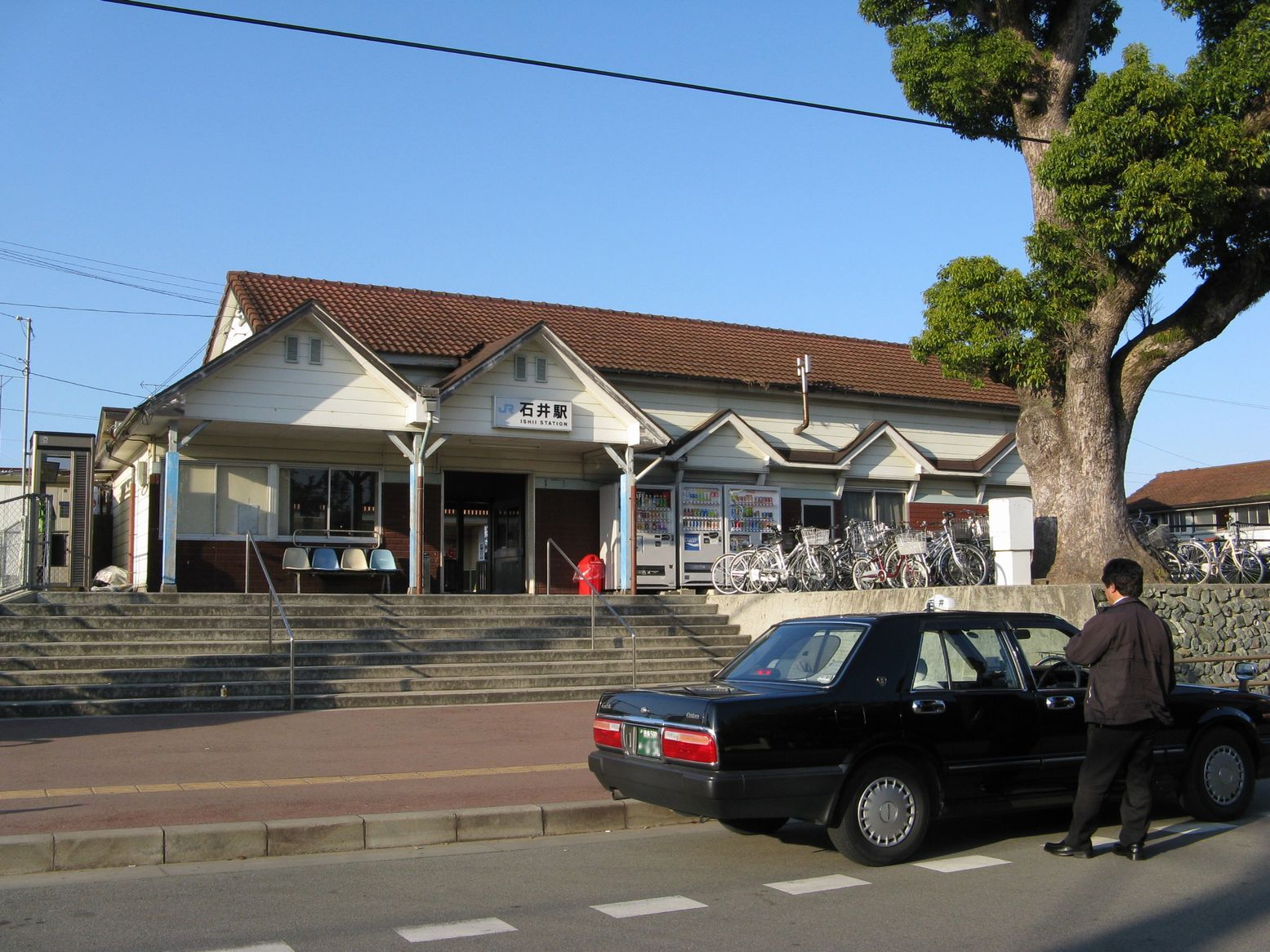 徳島線石井駅